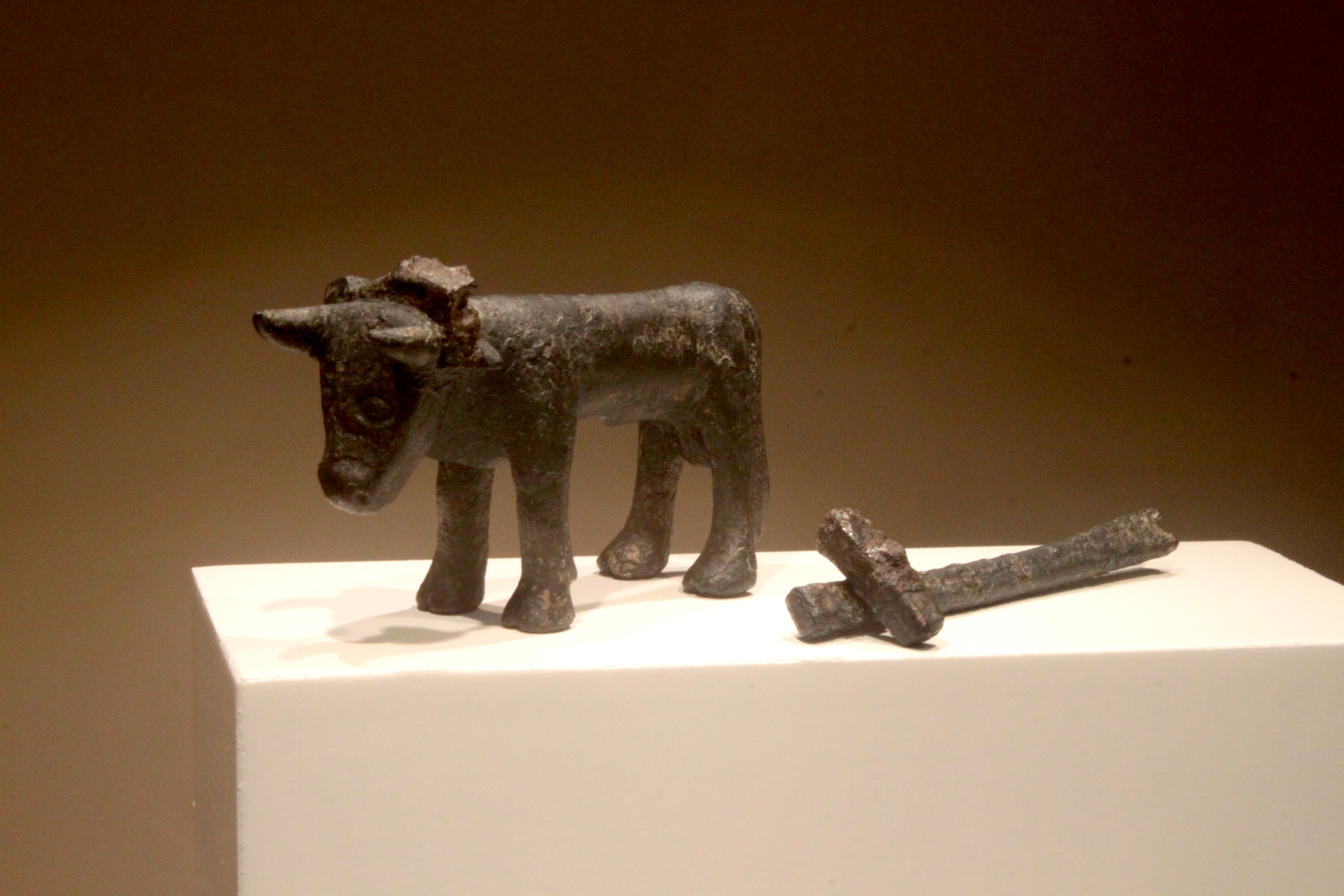 Figura en bronce representando un buey y un arado del yacimiento de Bastida de Les Alcusses del siglo IV aC. Depositada en el Museo de prehistoria de Valencia, Comunidad valenciana, España.